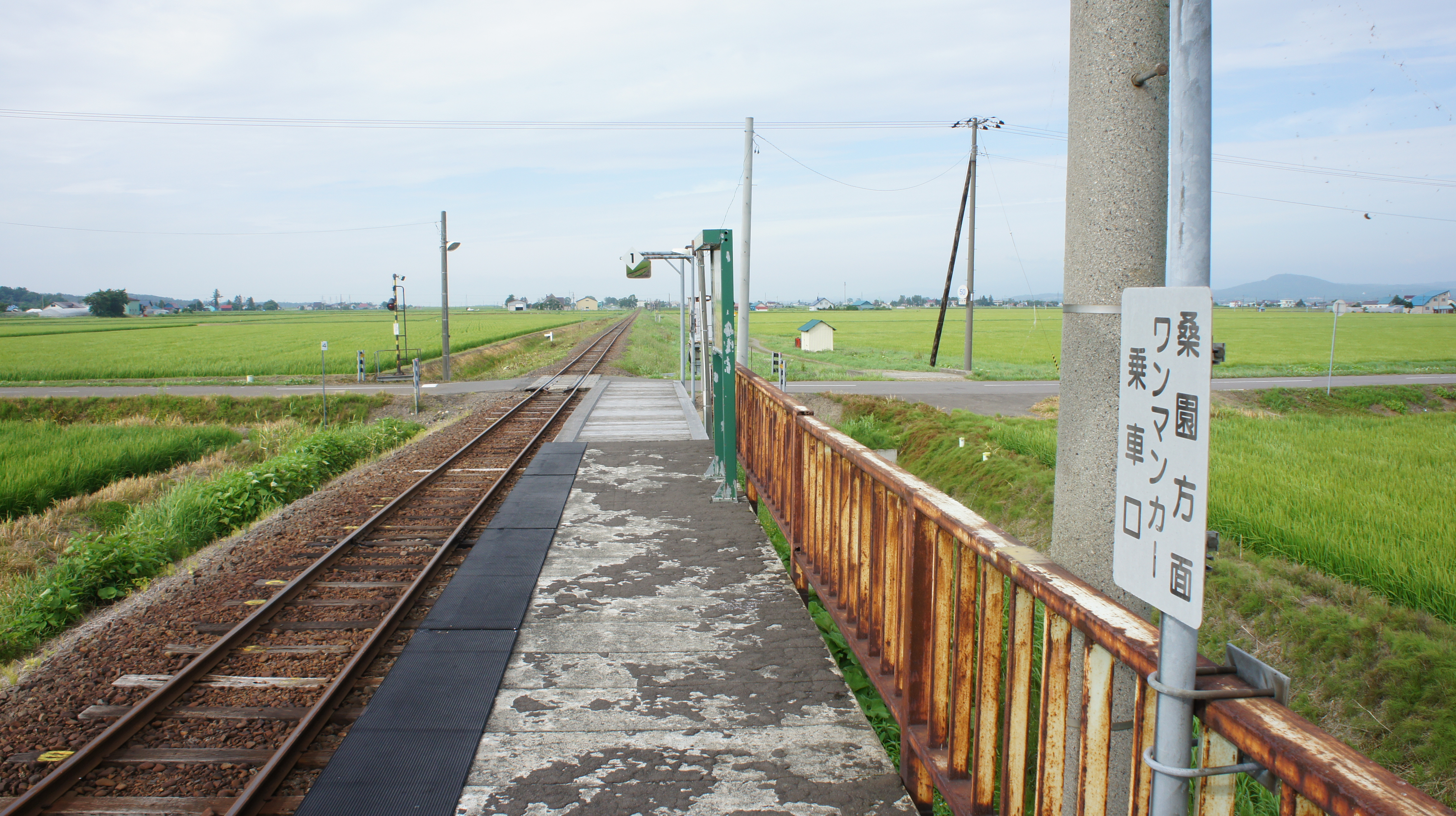 JR札沼線・南下徳富駅のホーム